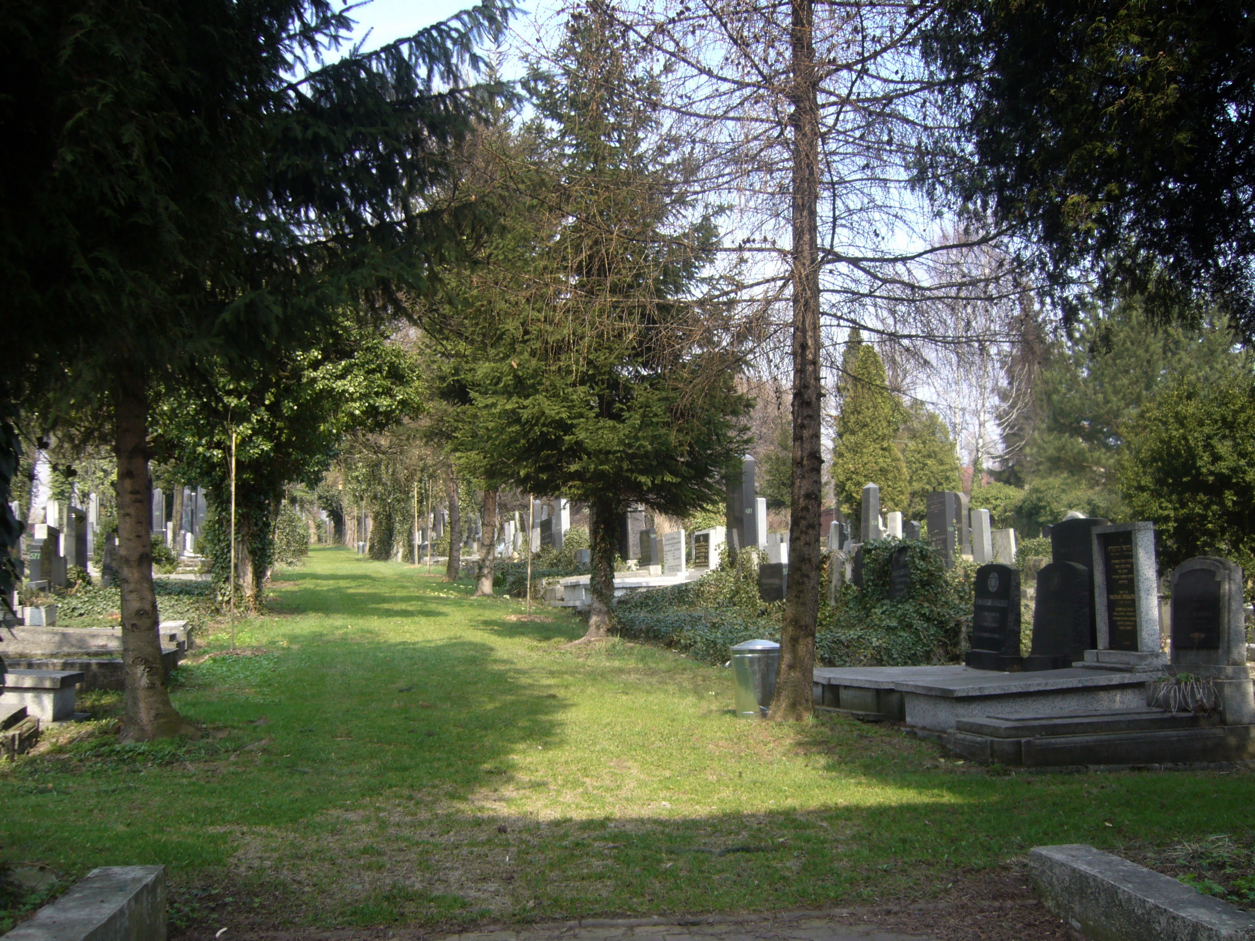 Aleja Zasłużonych na cmentarzu żydowskim w Bielsku-Białej.